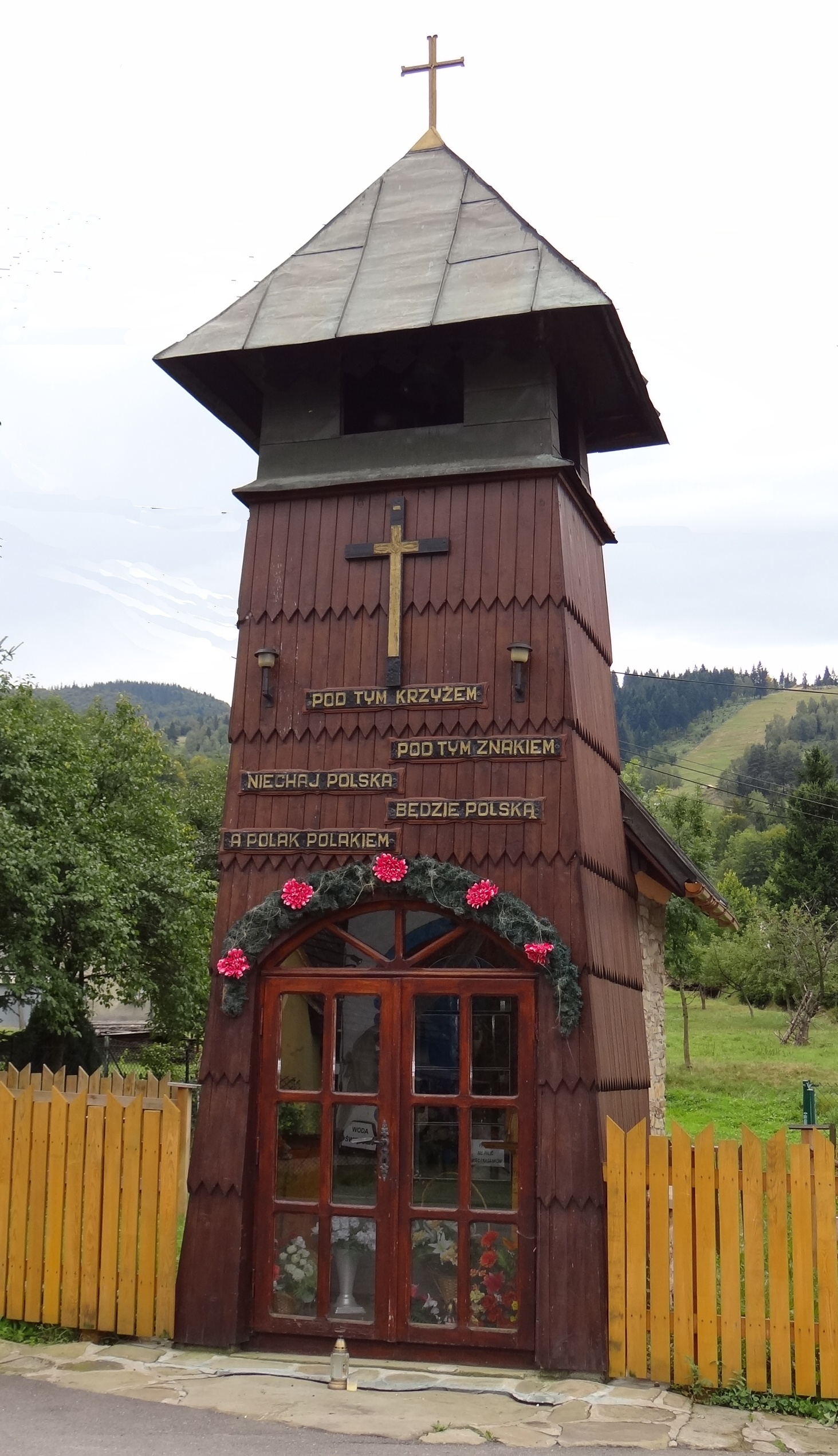 Oryginalna dzwonnica loretańska w Żabnicy